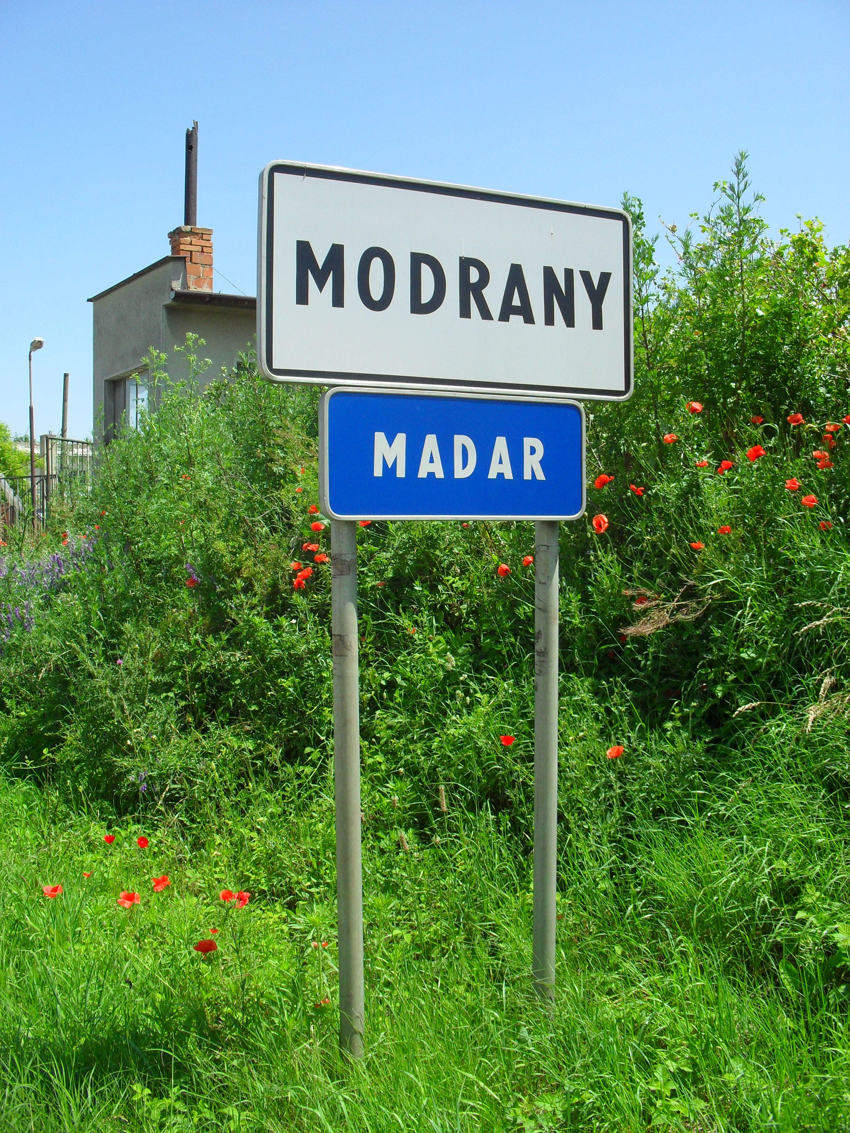 Madar - kétnyelvű helységnévtábla